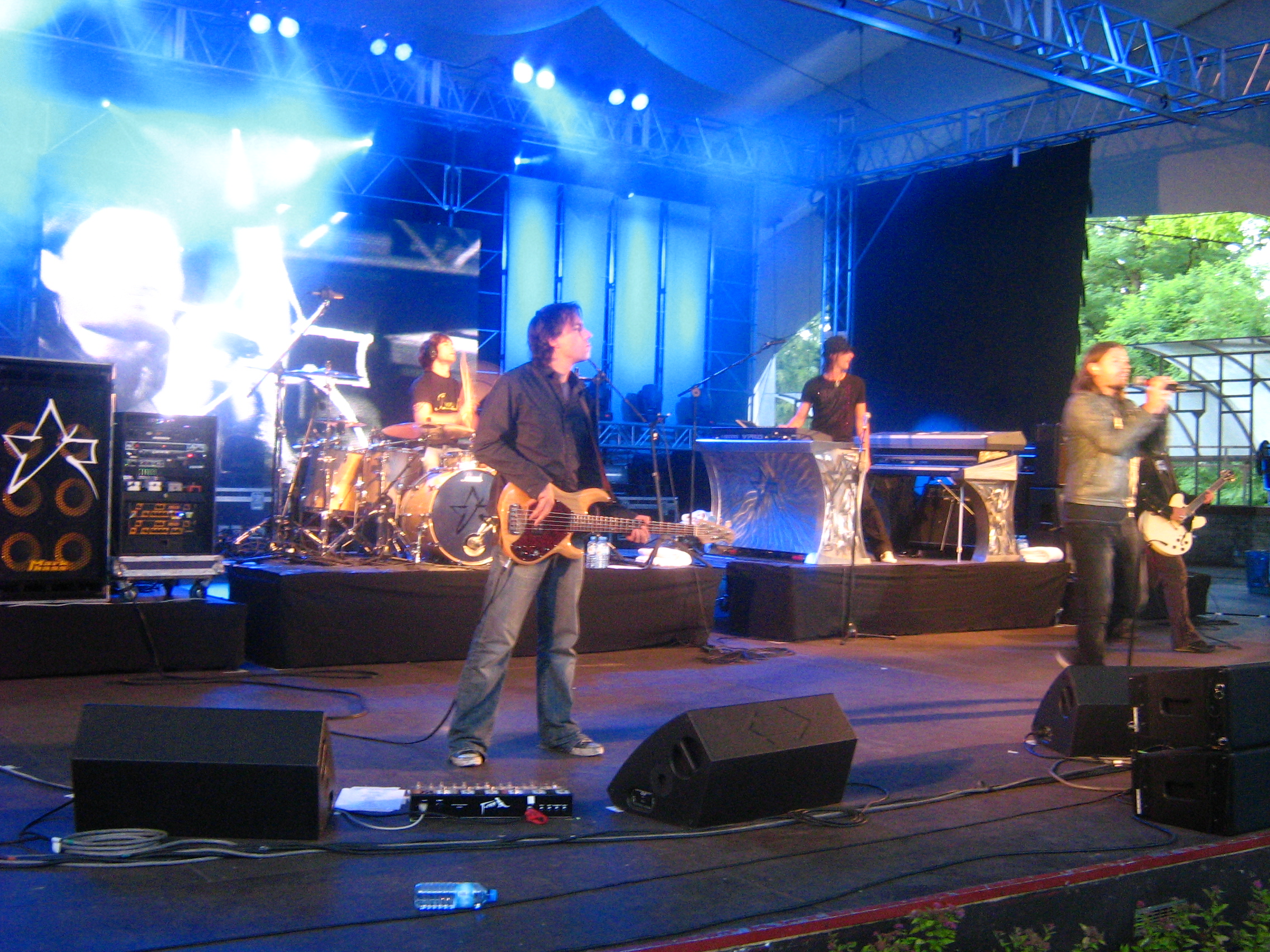 Zespół Reamonn podczas koncertu w Teatrze Letnim w Szczecinie. 5 lipca 2008.